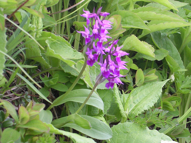 ハクサンチドリ (北海道富良野岳) Dactylorhiza aristata (Mt.Furano, Hokkaido, Japan)